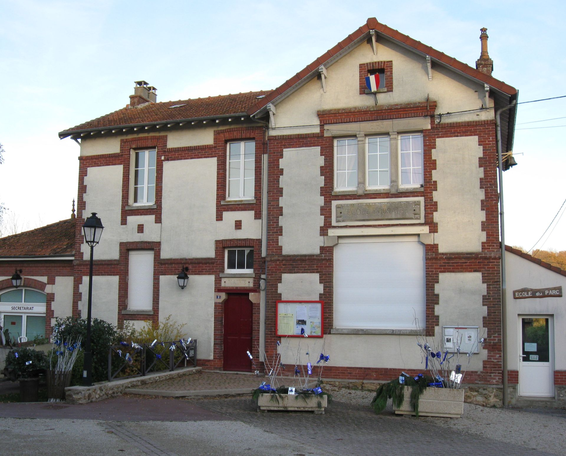 Mairie-école de Villemareuil. (Seine-et-Marne, région Île-de-France).